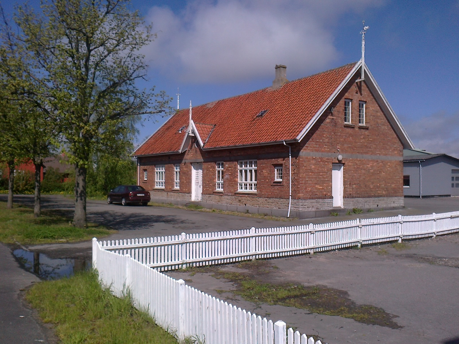 Aakirkeby Station, vejside